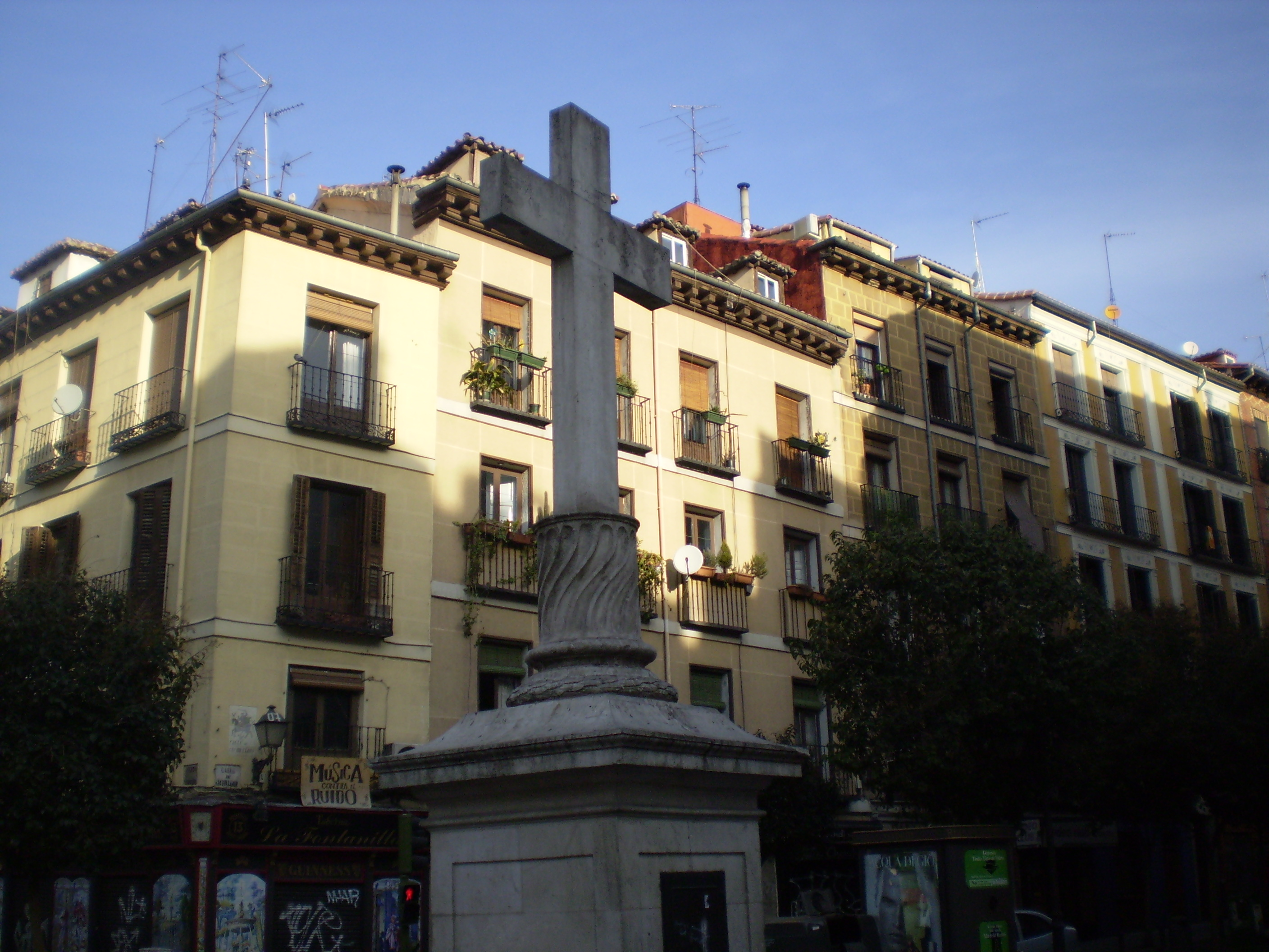 Puerta Cerrada Square. Madrid, Spain